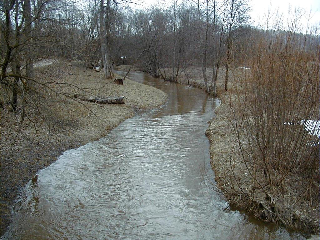 Bērzaunes upe pie Bērzaunes 2003-04-18